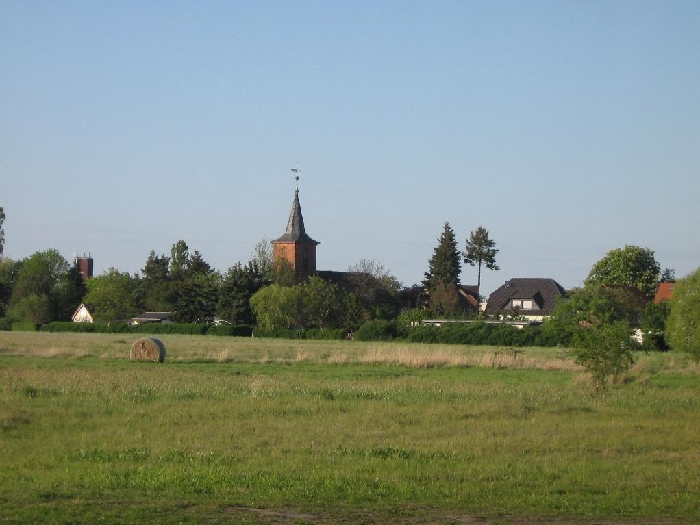 Blick von den Havelwiesen auf Döberitz bei Premnitz (Brandenburg, Germany)